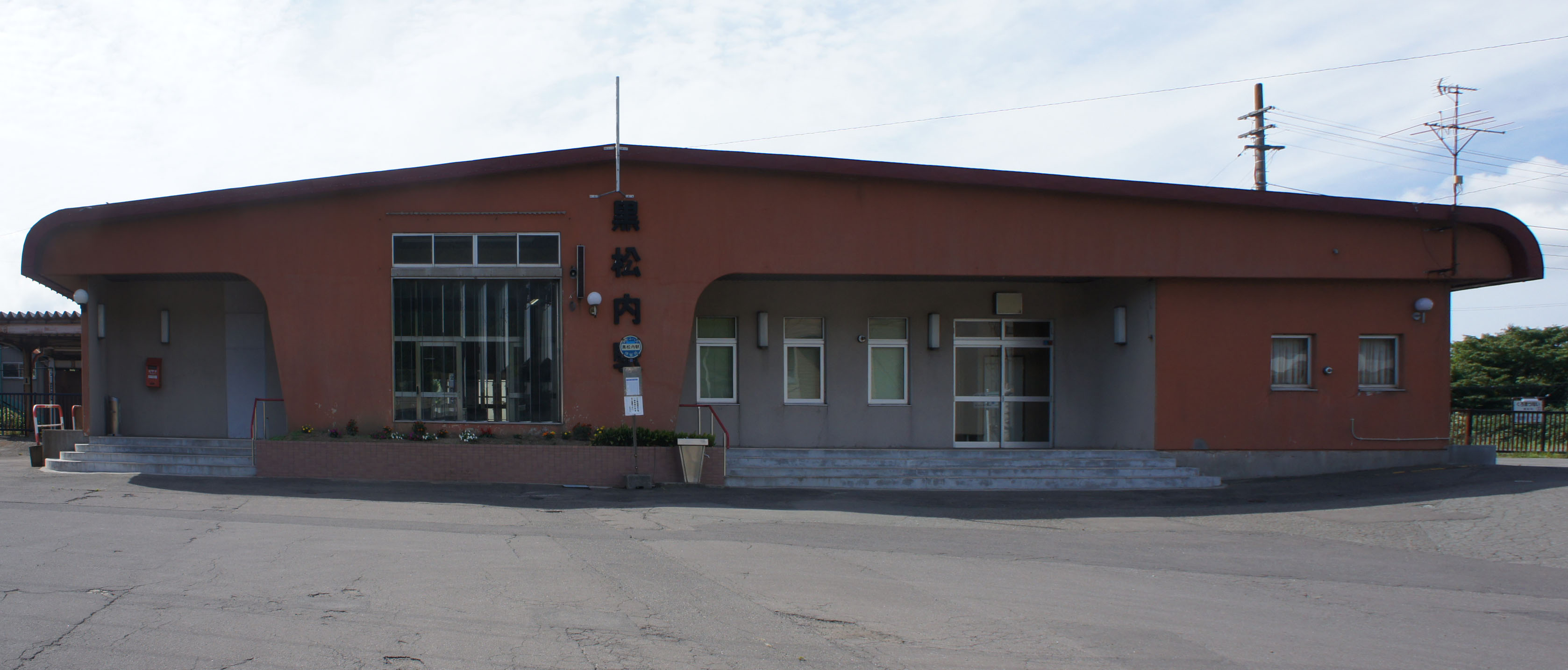 JR函館本線・黒松内駅の駅舎 Sony NEX-3